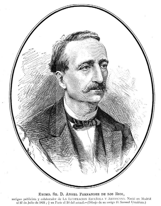 Excmo. Sr. D. Ángel Fernández de los Ríos, en La Ilustración Española y Americana.